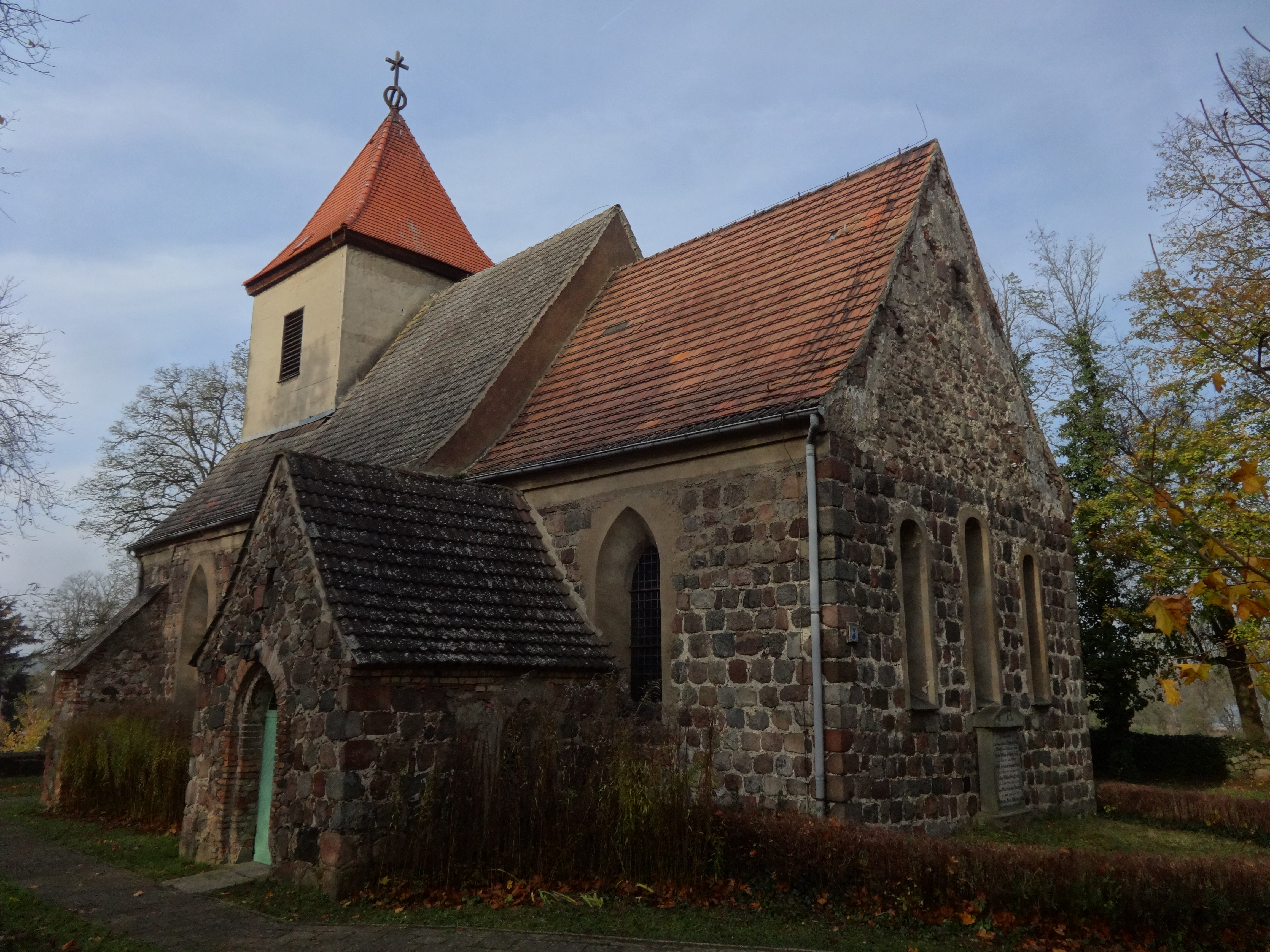 Die Dorfkirche in Obersdorf, einem Ortsteil der Stadt Müncheberg im Landkreis Oder-Spree, entstand in der zweiten Hälfte des 13. Jahrhunderts. Das Bauwerk wurde im Zweiten Weltkrieg stark zerstört und anschließend wiederaufgebaut.